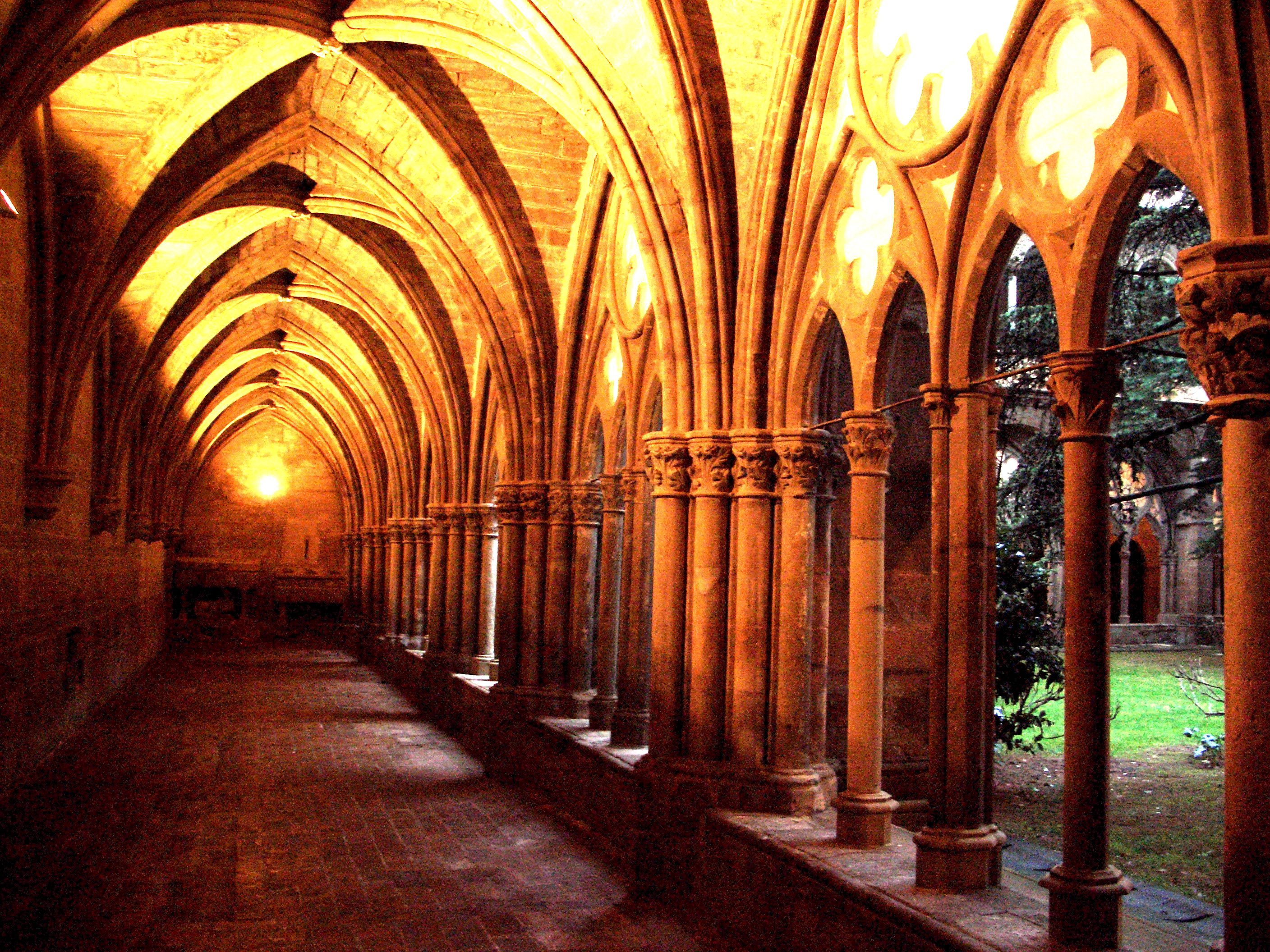 Monestir de Veruela - Claustre